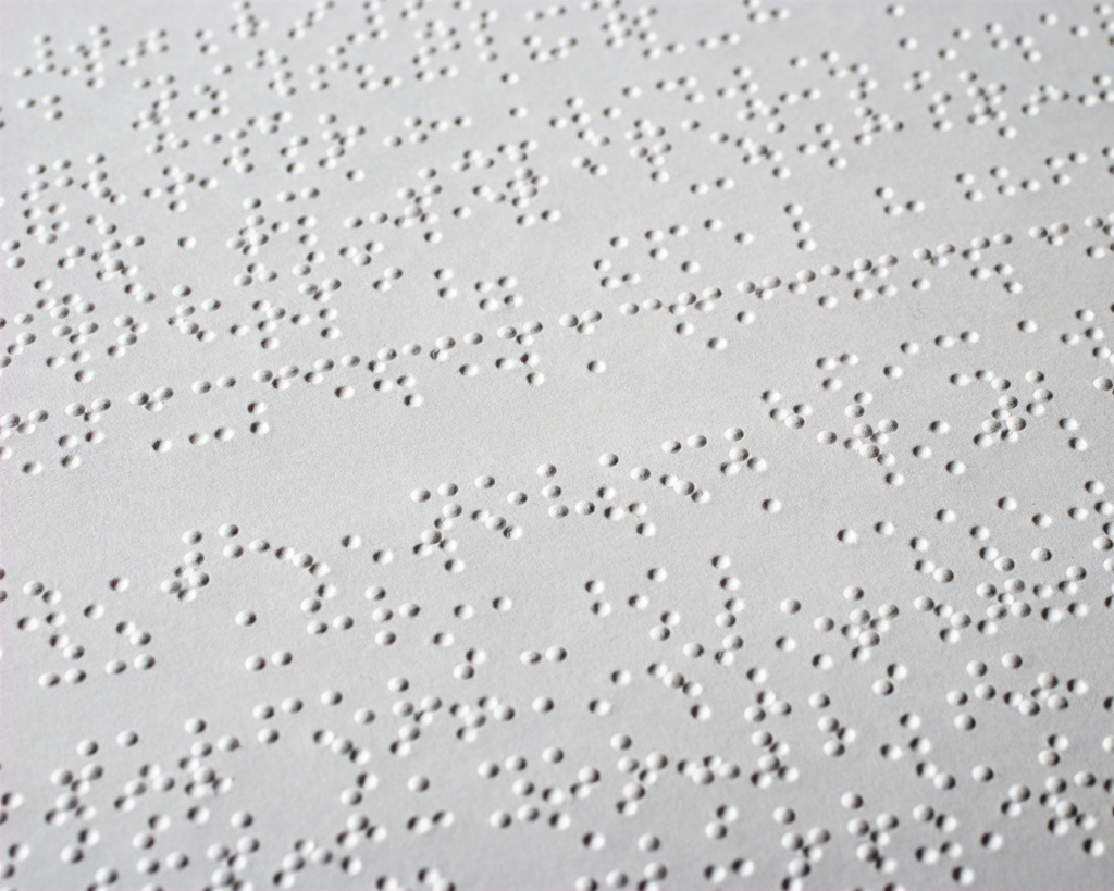 got from